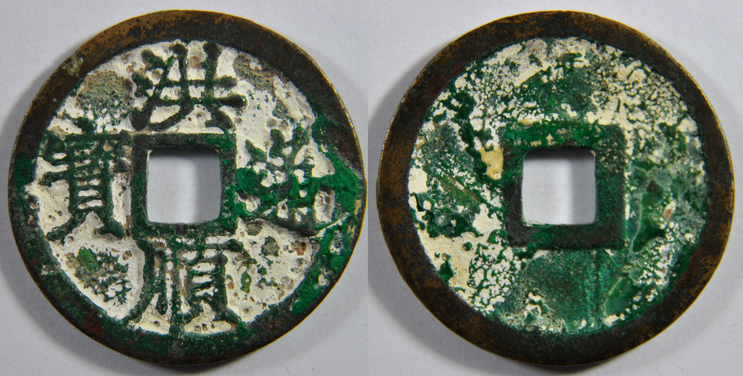 Une monnaie en bronze d'une sapèque de l'empereur Le Tuong Duc De (1509-1516), ère Hong Thuan (1509-1516) de la dynastie des Le postérieurs (Nha Hau Le) qui a dirigé le Vietnam de 1428 à 1788. A l'époque, le pays s'appelait le Dai Viet. A/ Hong Thuan thong bao (Monnaie courante de l'ère Hong Thuan) R/ vide Dimension : 24,97 mm Poids : 4 g. Remarques : Il existe deux types de cette monnaie. Celle-ci appartient au type 1 : Les 3 traits à gauche du caractère Hong (en haut) sont séparés. Sur le type 2, ils sont tracés en continu. Le point de la racine de thong (à droite) est séparé de la racine. Ce jeune empereur (1495-1516) prend le trone après le suicide contraint de Uy Muc De, le précédent empereur (1505-1509), fils de Le Thanh Tong. Tuong Duc De est un cousin de celui-ci. Il laisse gouverner les généraux rebelles qui ont renversé son prédécesseur. Il s'agit de Trinh Duy Sang, Nguyen Hoan Du, Le Quang Do, Trinh Tuy et Mac Dang Dung. C'est pendant son court règne qu'est publié un livre d'histoire, Dai Viet Thong Giam Thong Khao par Vu Quynh. Les révoltes paysannes se multiplient. En 1512, Tran Tuan prend la capitale. Pendant le premier mois de 1516, Tran Cong Ninh se soulève au Son Tay. La révolte de Tran Cao a débuté en 1515 dans la province de Hai Duong. Il se proclame empereur sous l'ère Thien Ung car il se prétend descendant des Tran. Enfin, au printemps de 1516, Trinh Duy Sang fait assassiner l'empereur par un groupe de gardes impériaux et place sur le trone Le Chieu Tong (1516-1521). La période de prospérité est bien finie. Références : 532 BNF (Catalogue des monnaies vietnamiennes, François Thierry, 1988) Indice de rareté : TC (Très Commune)